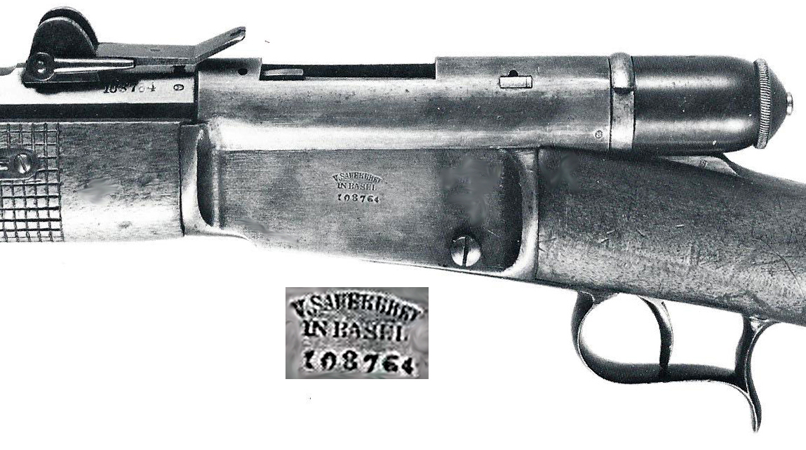 Vetterli 1869 71 Sauerbrey